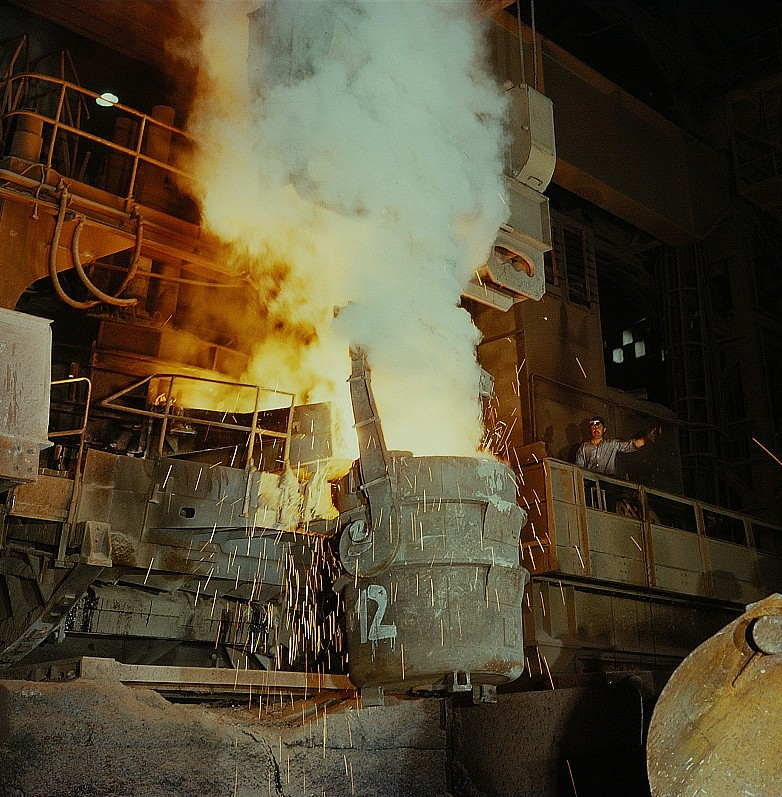 Original image description from the Deutsche Fotothek Metallurge für Hüttentechnik